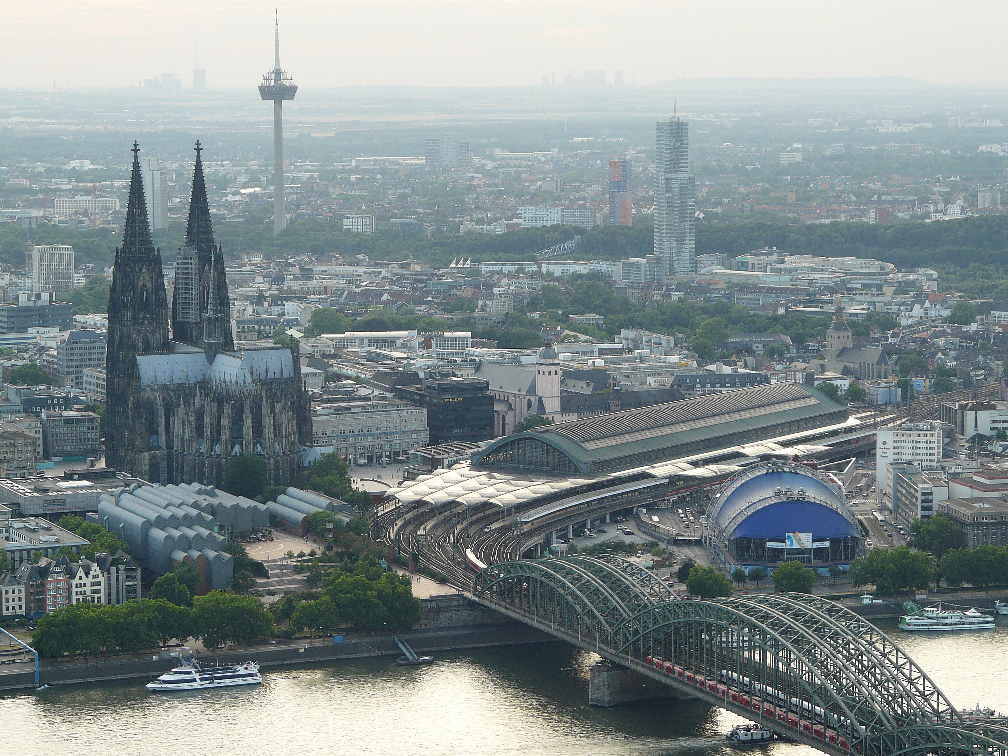 Der Kölner Dom, der Hauptbahnhof und die Hohenzollernbrücke